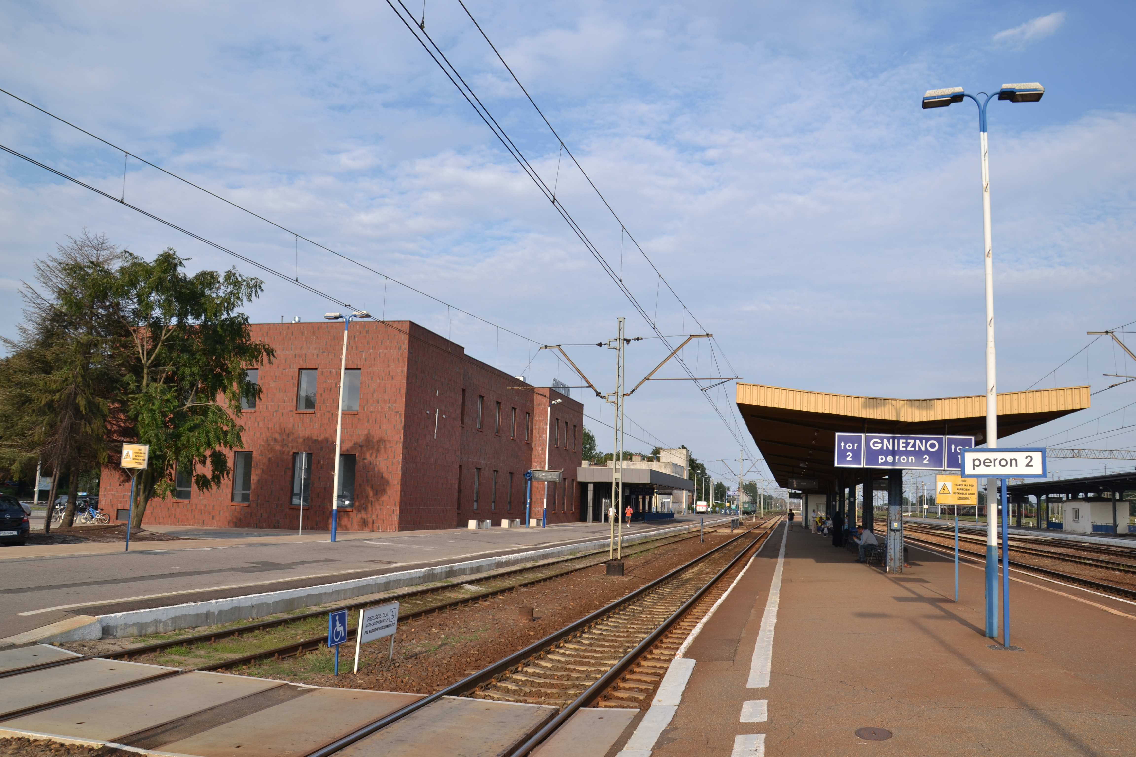 Widok dworca kolejowego w Gnieźnie od strony peronów This photo was taken during Railway Wikiexpedition 2015 set up by Wikimedia Polska Association in cooperation with Fundacja Grupy PKP. You can see all photographs in category Wikiekspedycja kolejowa 2015.